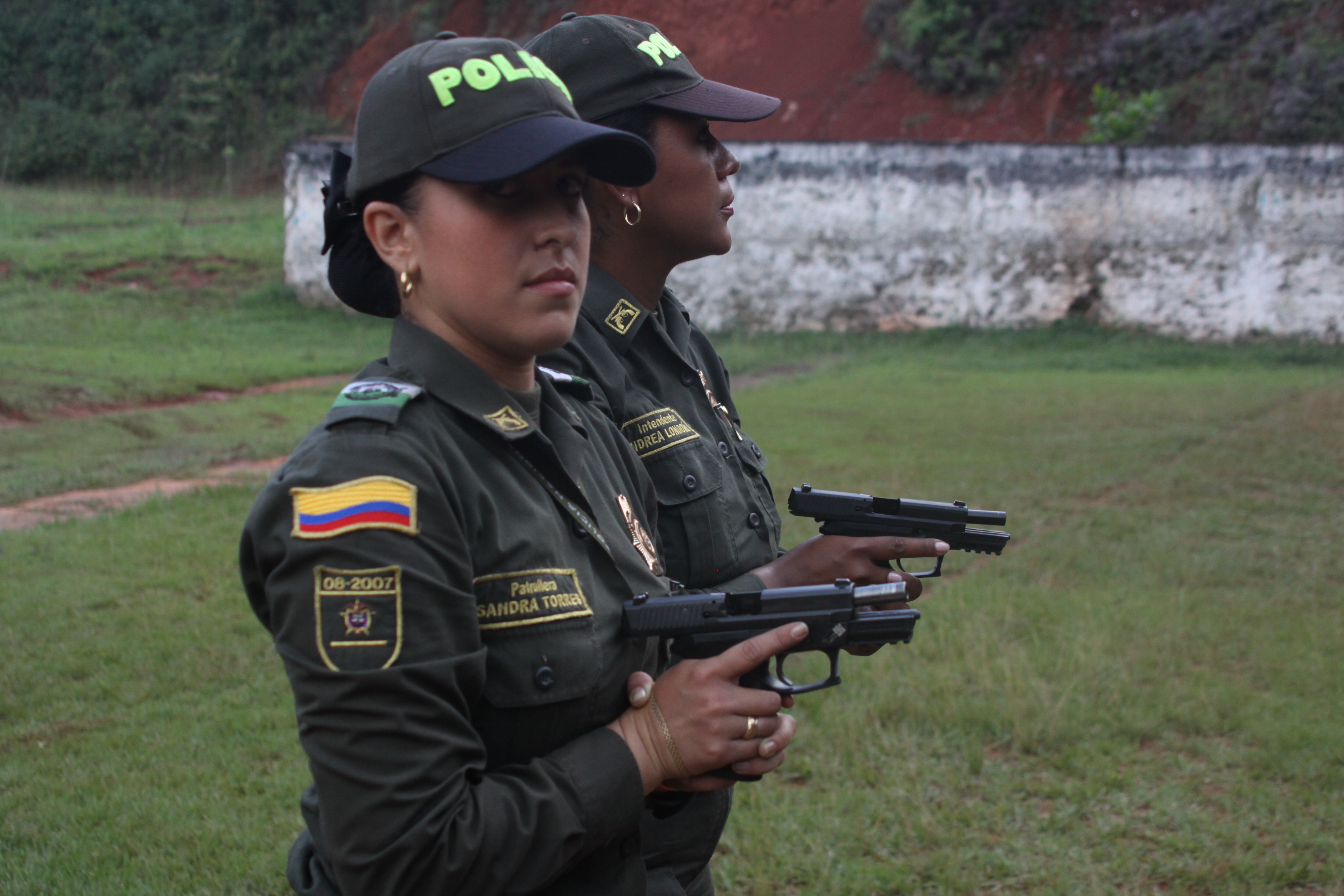 VII Cumbre Alianza del Pacífico